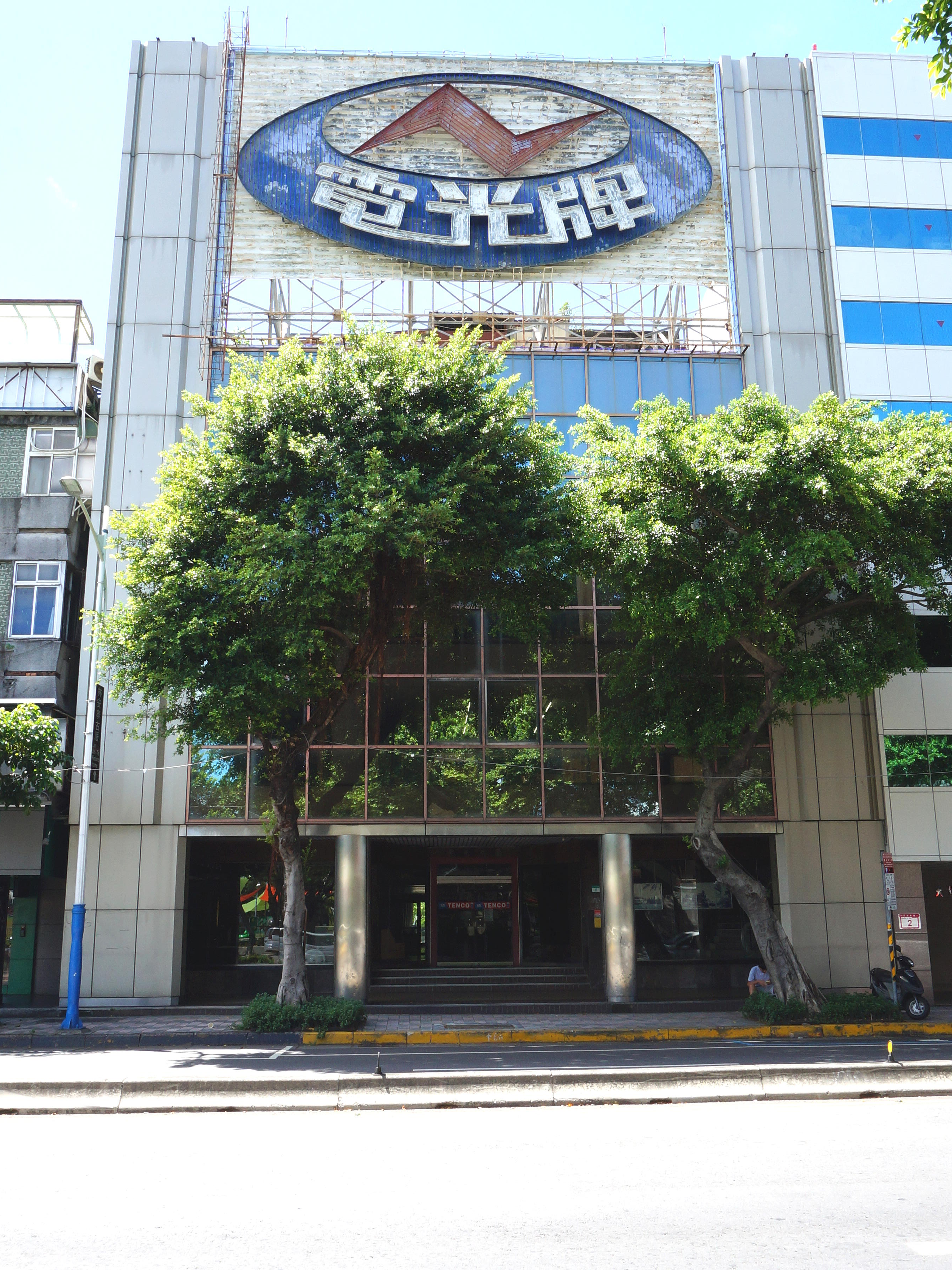 振吉電化廠台北分公司，地址：臺北市中山區民族東路6號。